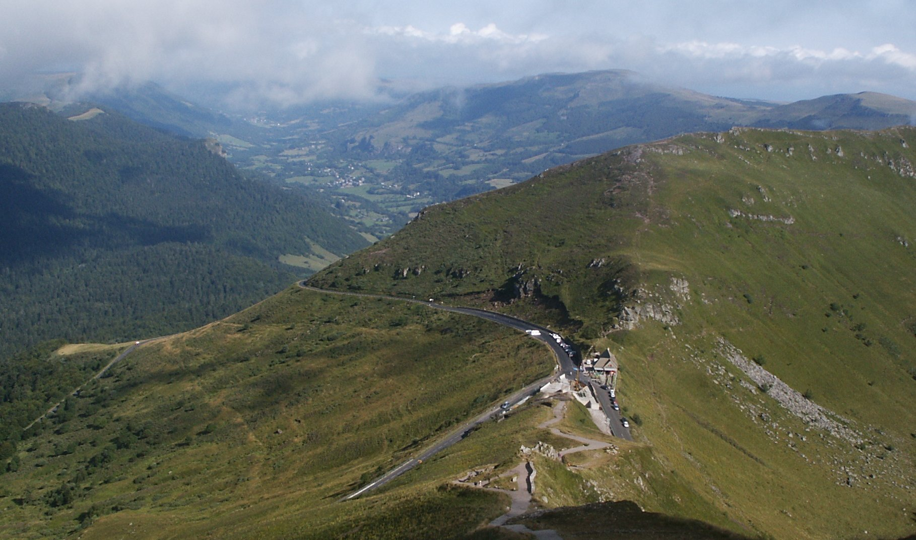 Le Pas de Peyrol vu depuis le Puy Mary